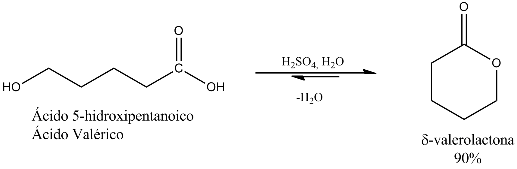 Formación de lactonas a partir de hidroxicarboxílicos